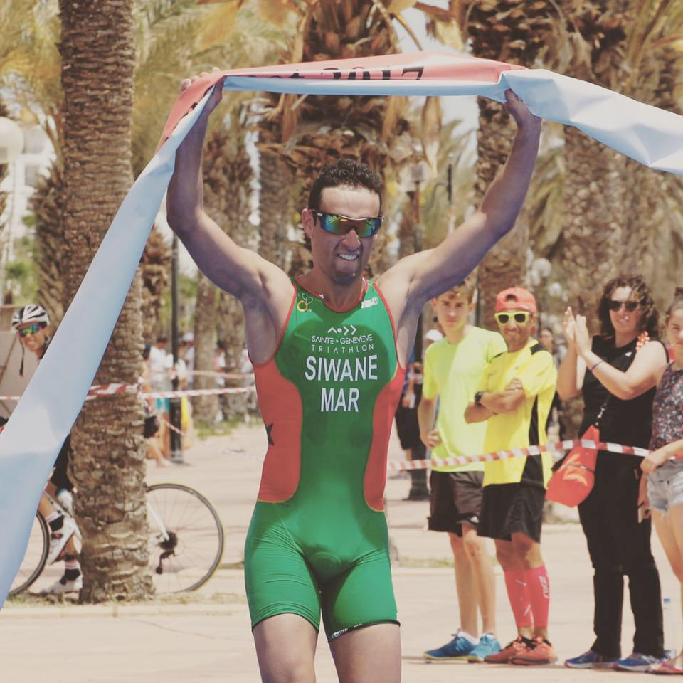 BADR SIWANE